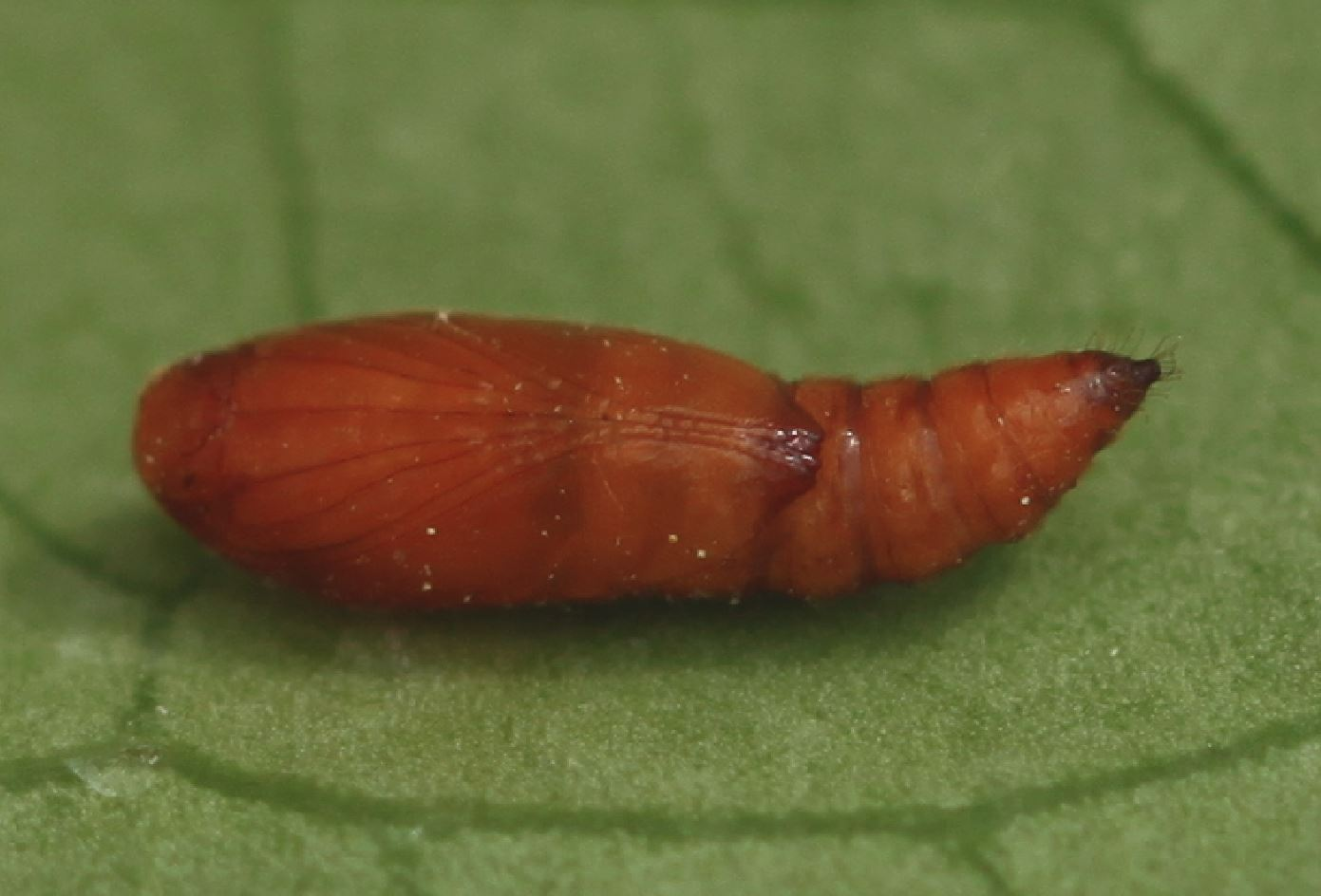 Puppe von Anacampsis timidella am 22. Mai 2020